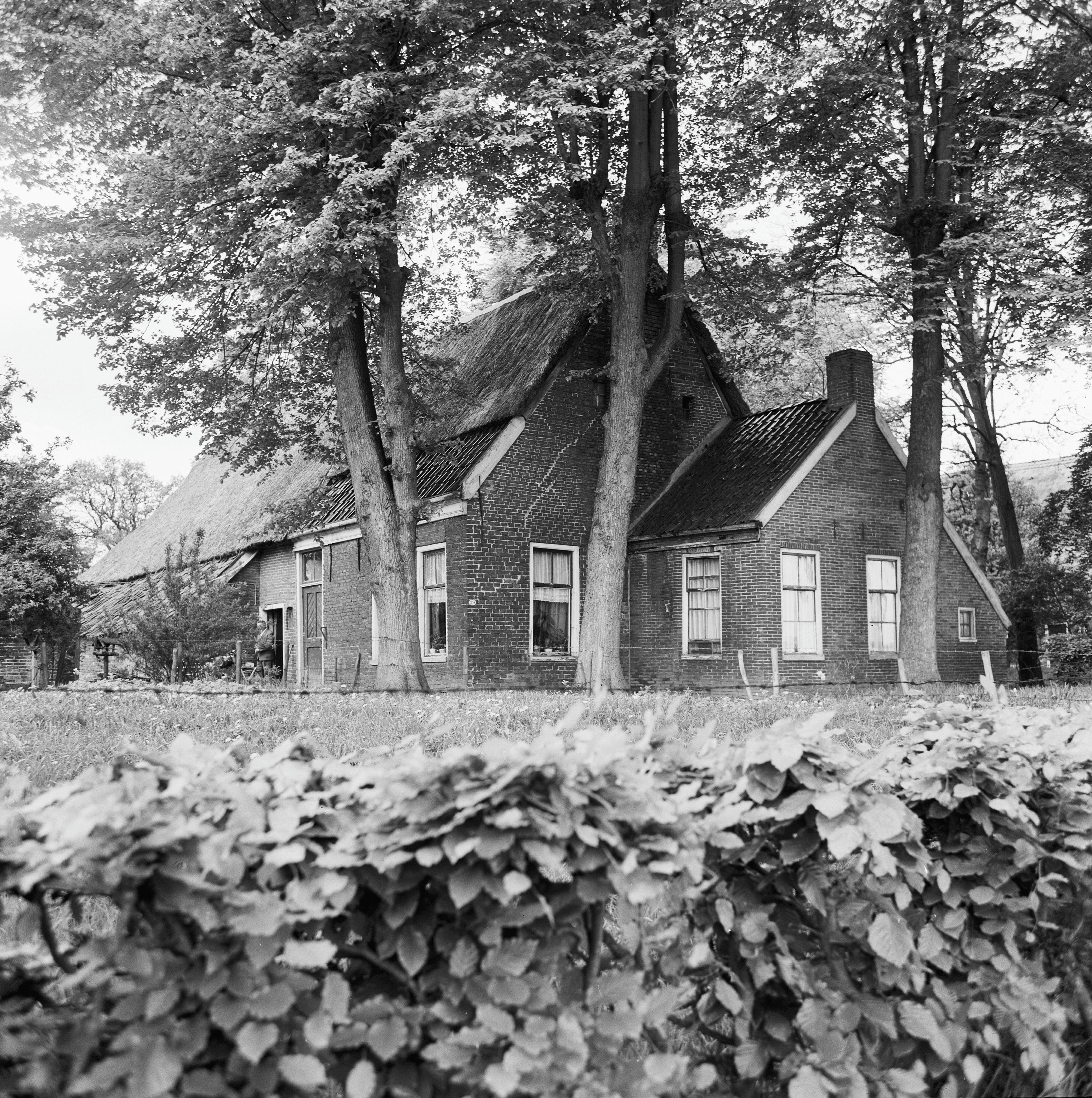 voor